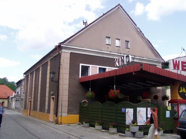 Budynek pszczyńskiej synagogi